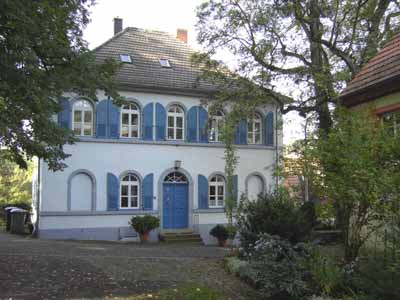 Pfarrhaus Finkenbach-Gersweiler (1830). Kirchgasse 10: Protestantisches Pfarrhaus.